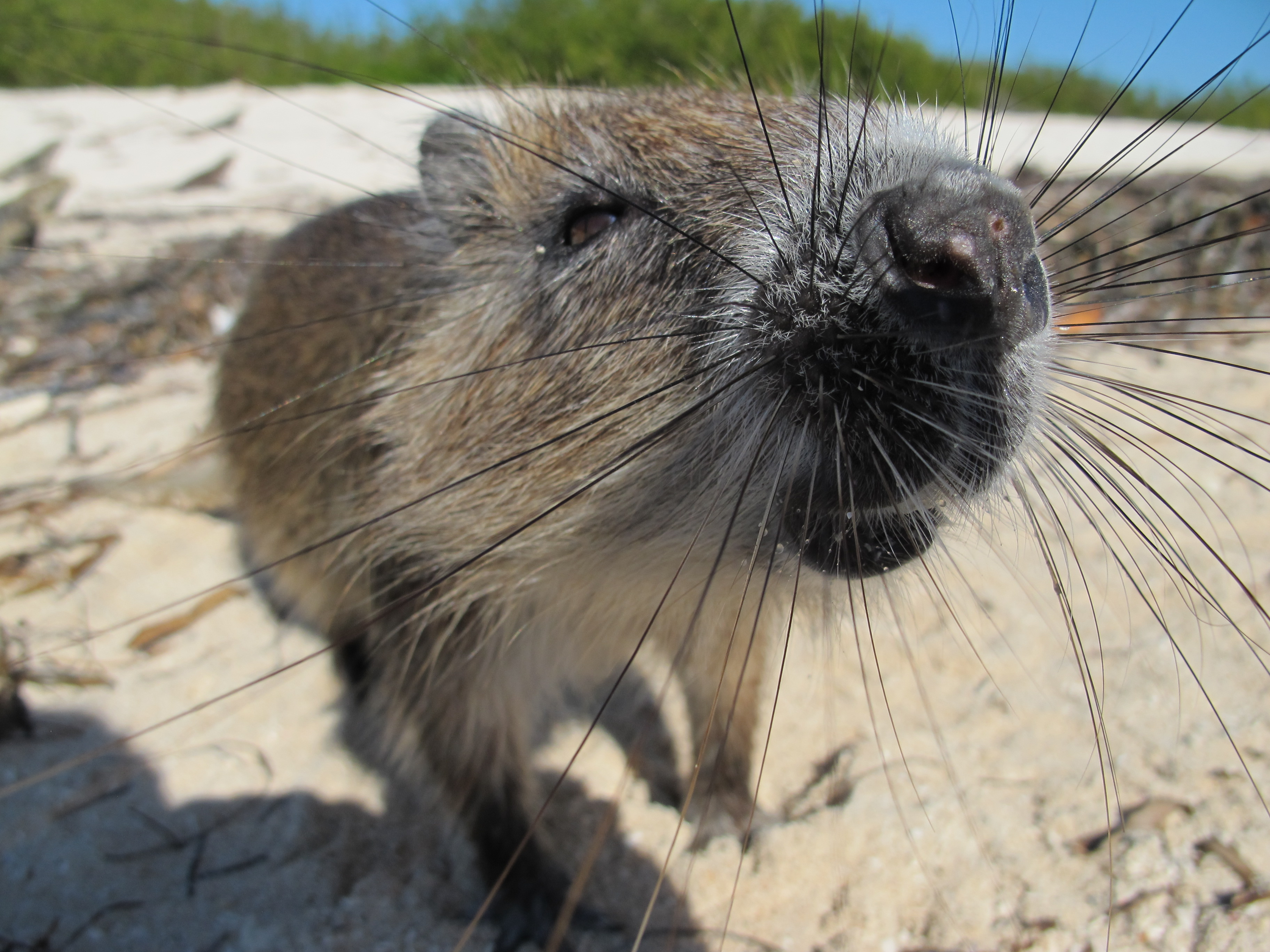 Jutia en Jardines de la Reina